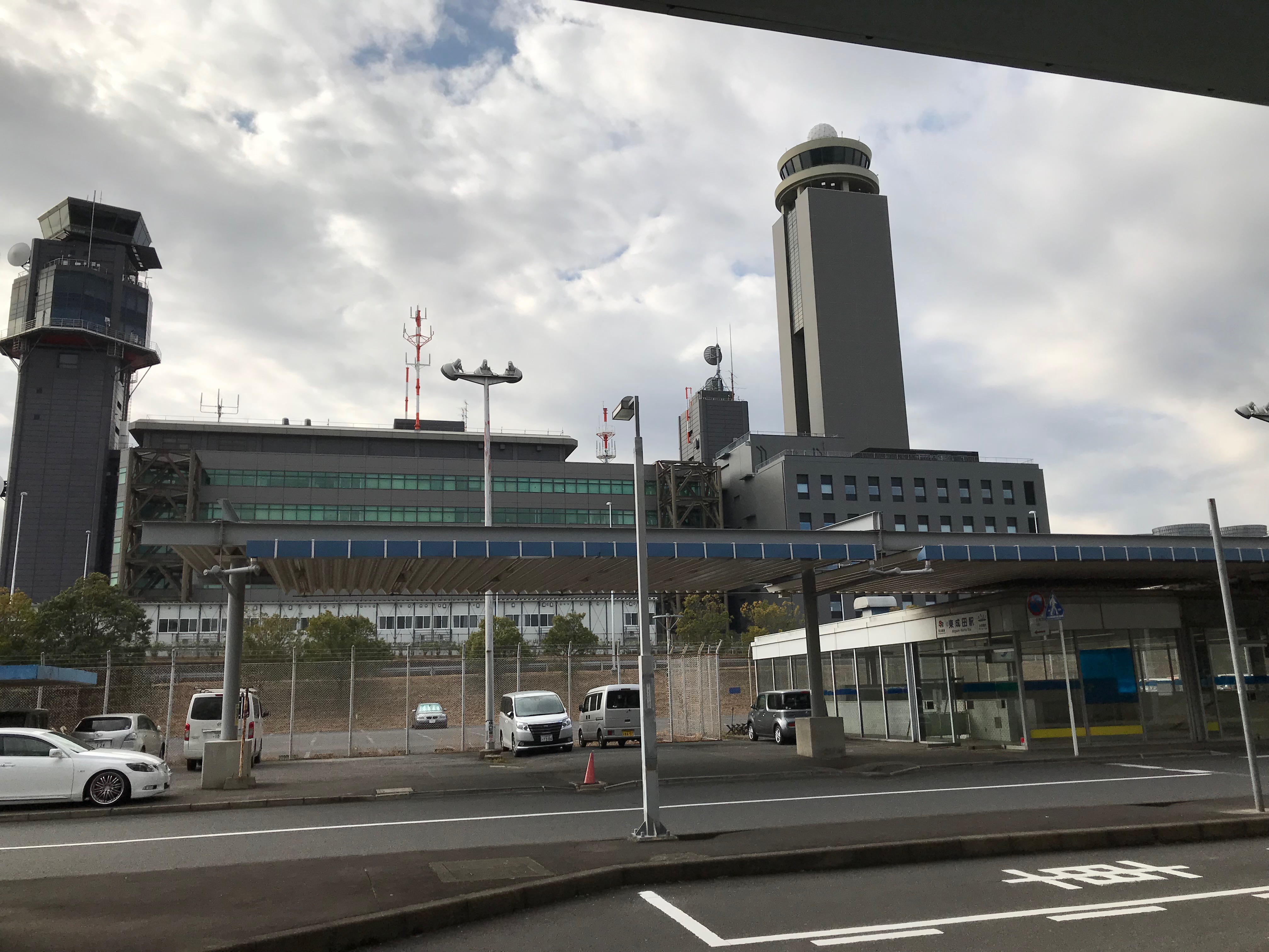 東成田駅外観